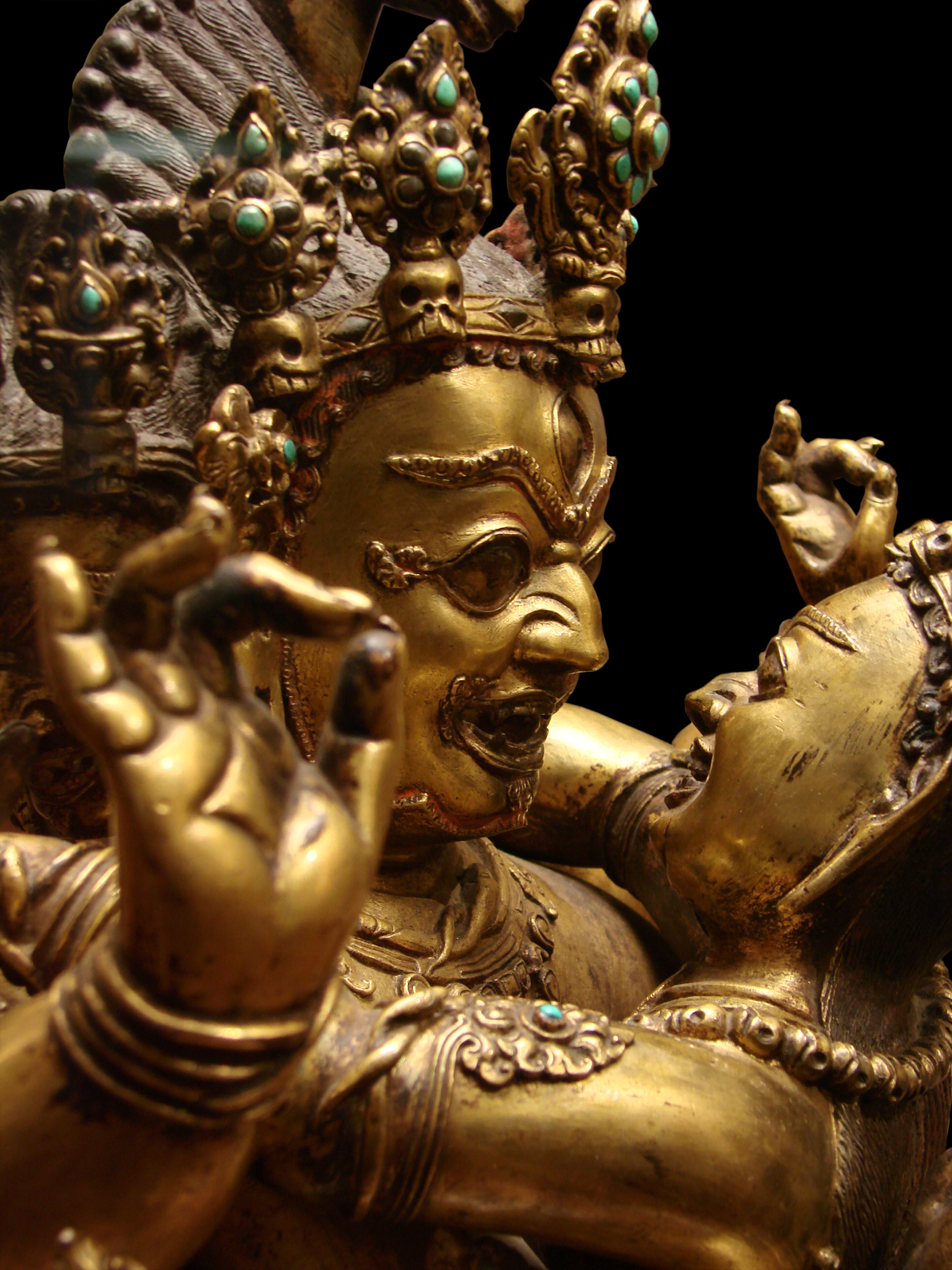 Hayagriva (gardien de la doctrine: dharmapala) et sa parèdre, cuivre doré et incrusté, fin 15ème-début 16ème siècle, Tibet. Musée Guimet à Paris.